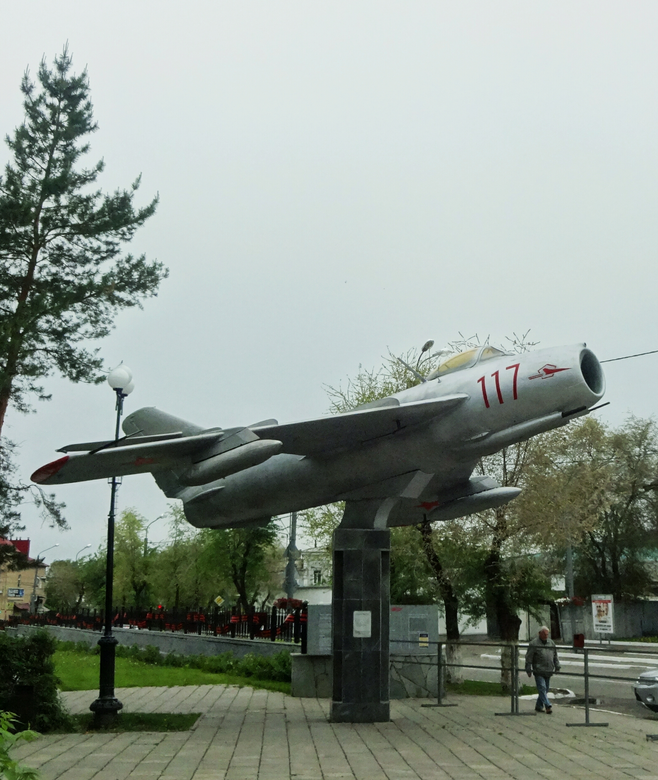 Самолет, на котором в 1955-1957 гг. летал курсант Оренбургского высшего авиационного училища Гагарин Ю.А.: улица Челюскинцев, 21, Оренбург, Оренбургская область